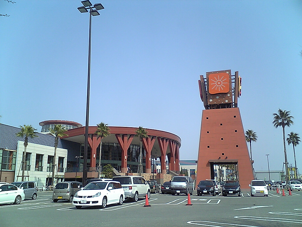 福岡市西区にあるショッパーズモールマリナタウン